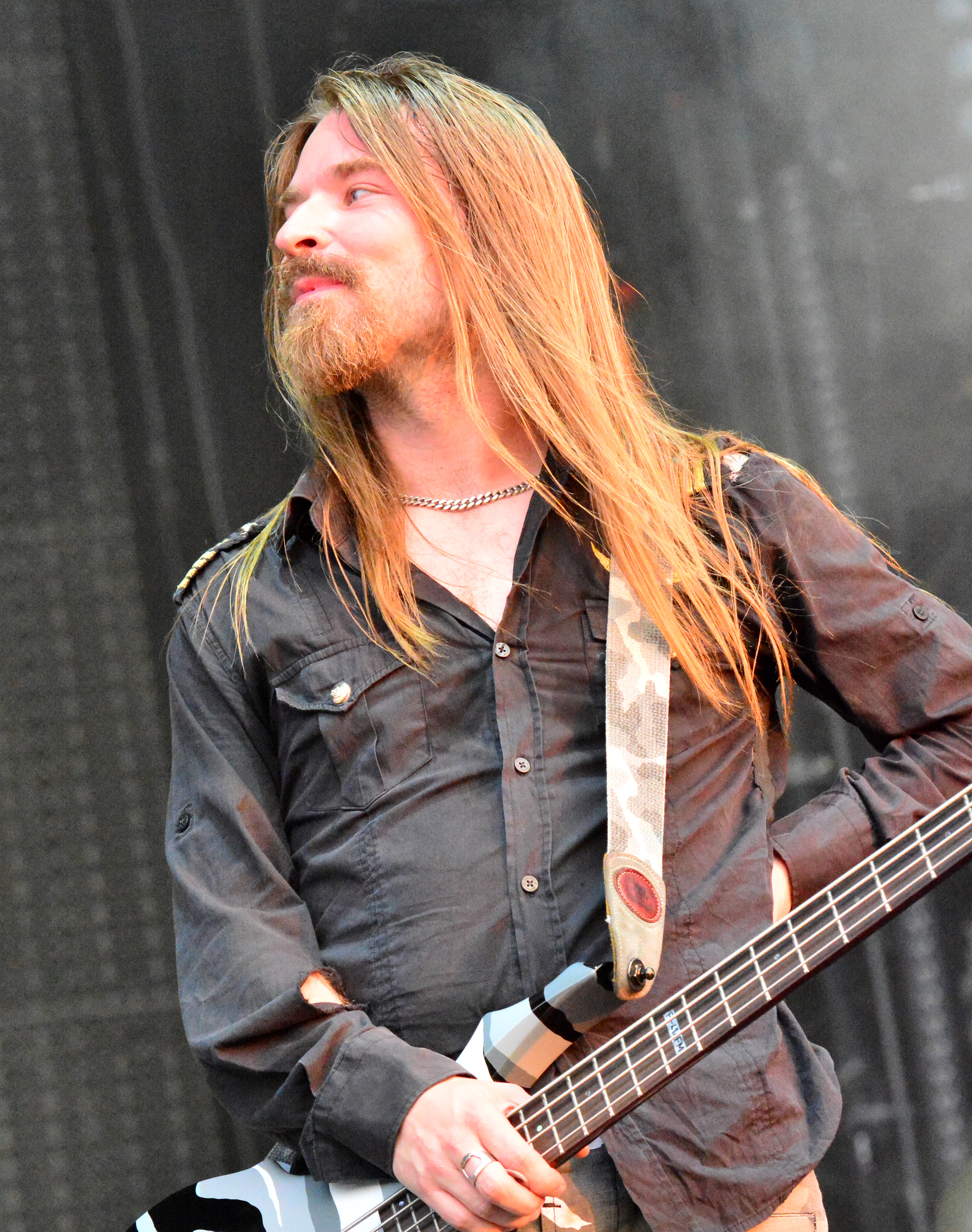 Sabaton beim Wacken Open Air 2015